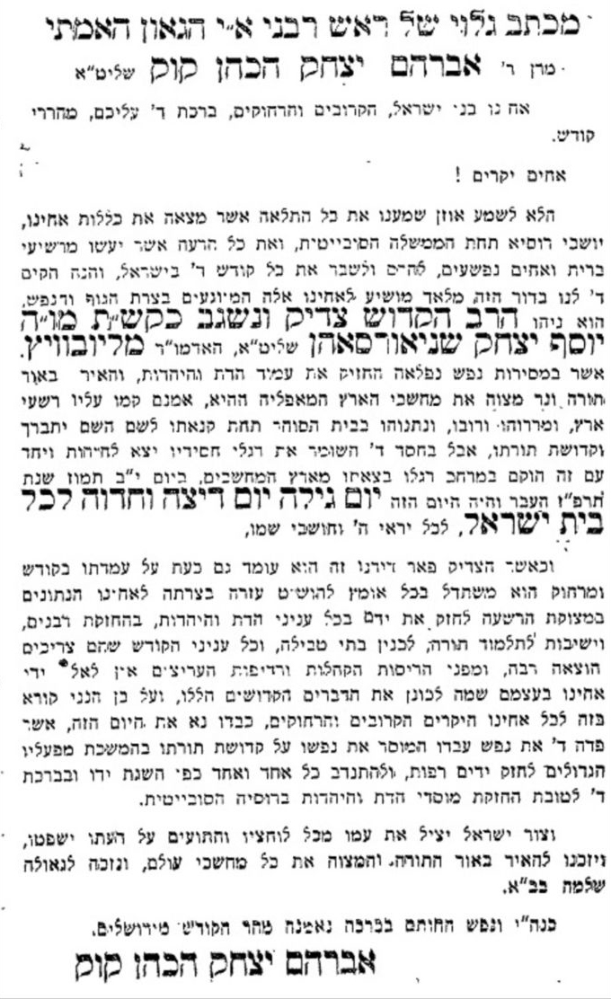 מכתב-מודעה של הרב אברהם יצחק הכהן קוק בעיתון "דואר היום" לכבוד י"ב בתמוז תרפ"ח - יום השנה לשחרורו של רבי יוסף יצחק שניאורסון מהכלא הסובייטי